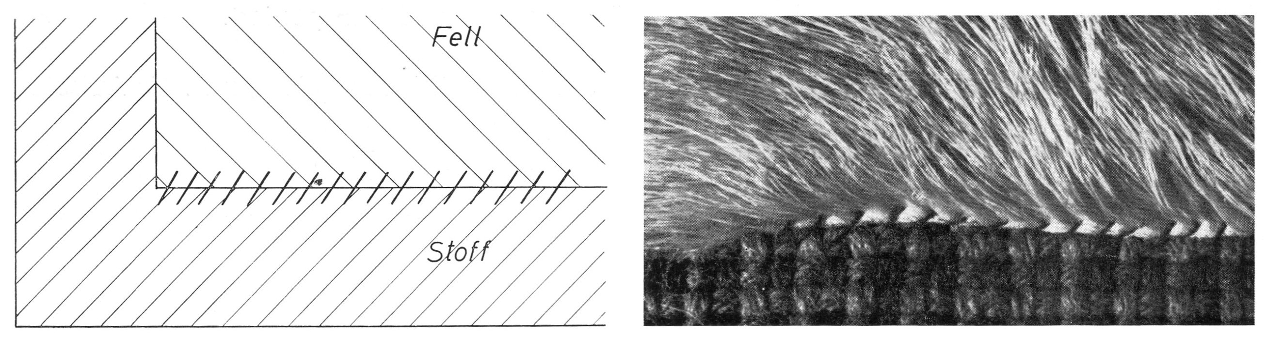 Nähte in der Kürschnerei: Absatz „Nähtechnik, Ledernähte, Haarnähte, Vernadeln“.